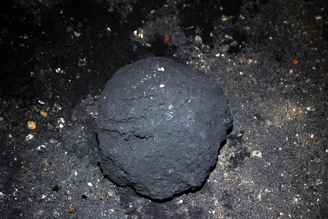 ჭიათურა = Tschiatura - Manganerz